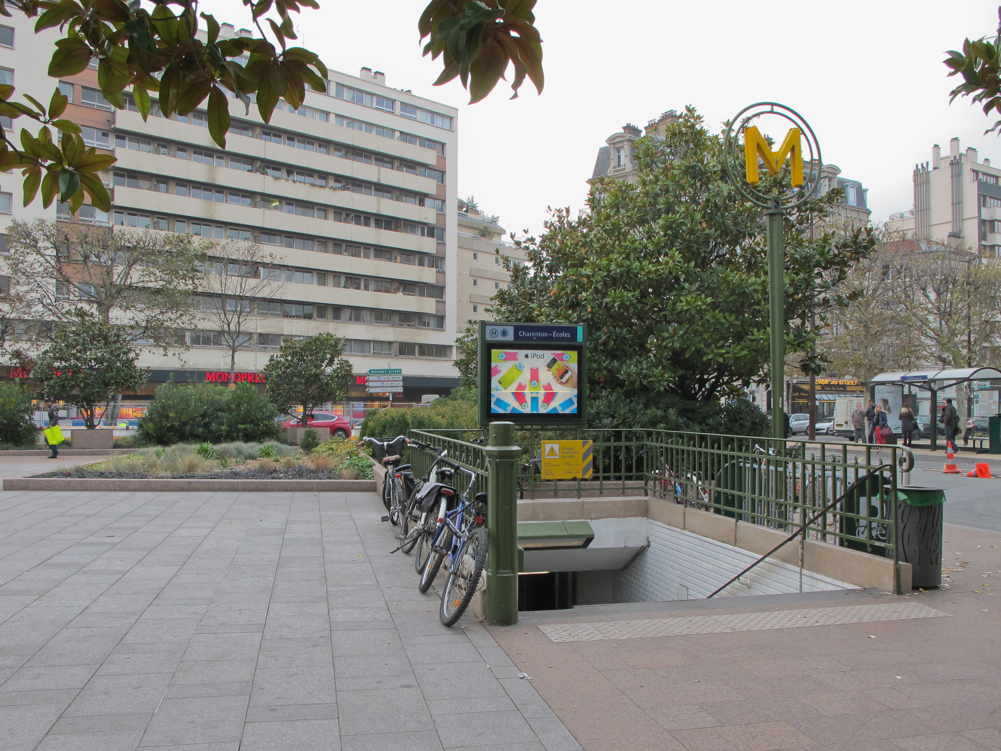 StationCharenton - Écoles. Ligne 8 du métro de Paris - Charenton-le-Pont, France